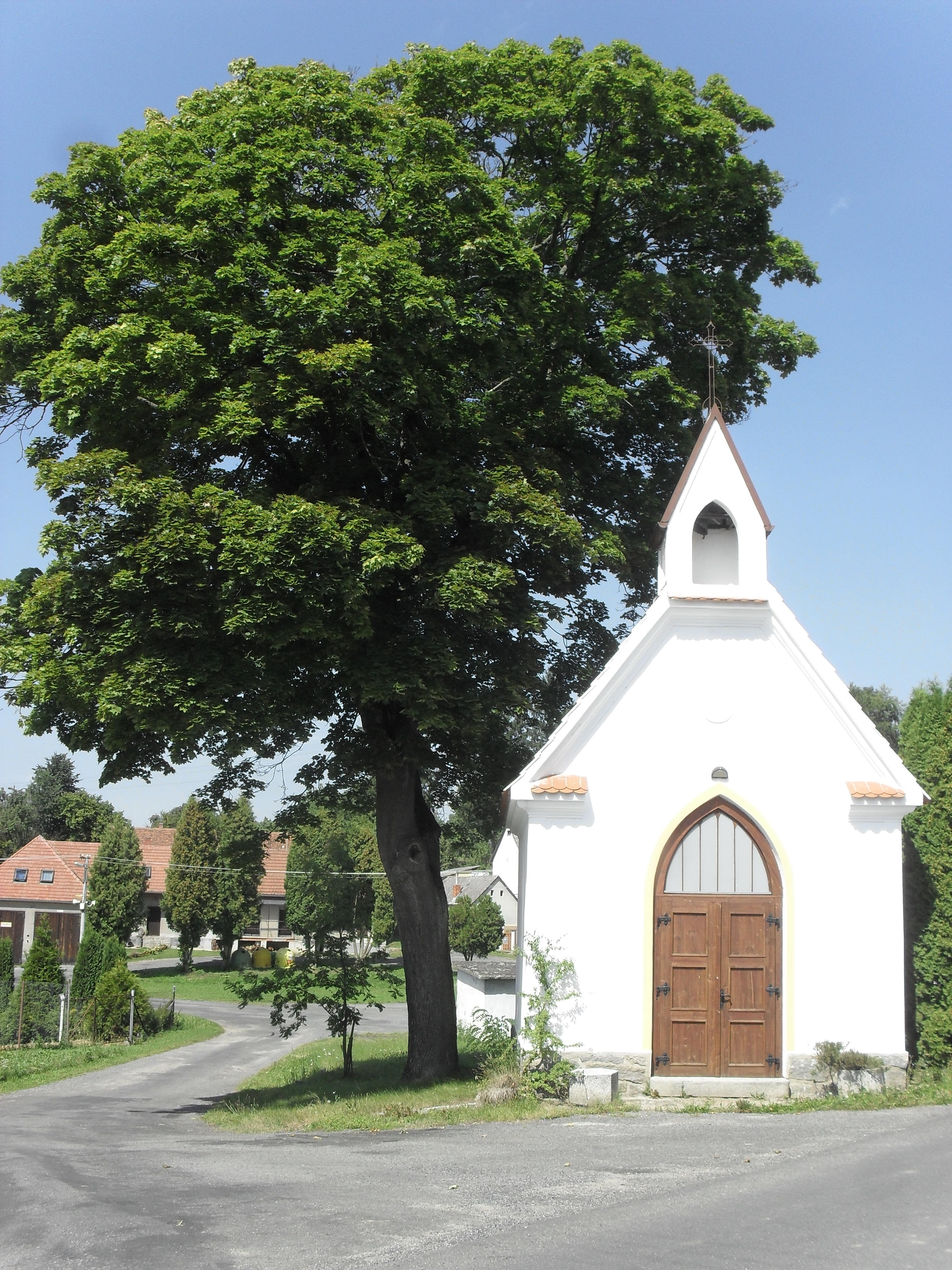 Fotografie pořízena v obci Slivonice.